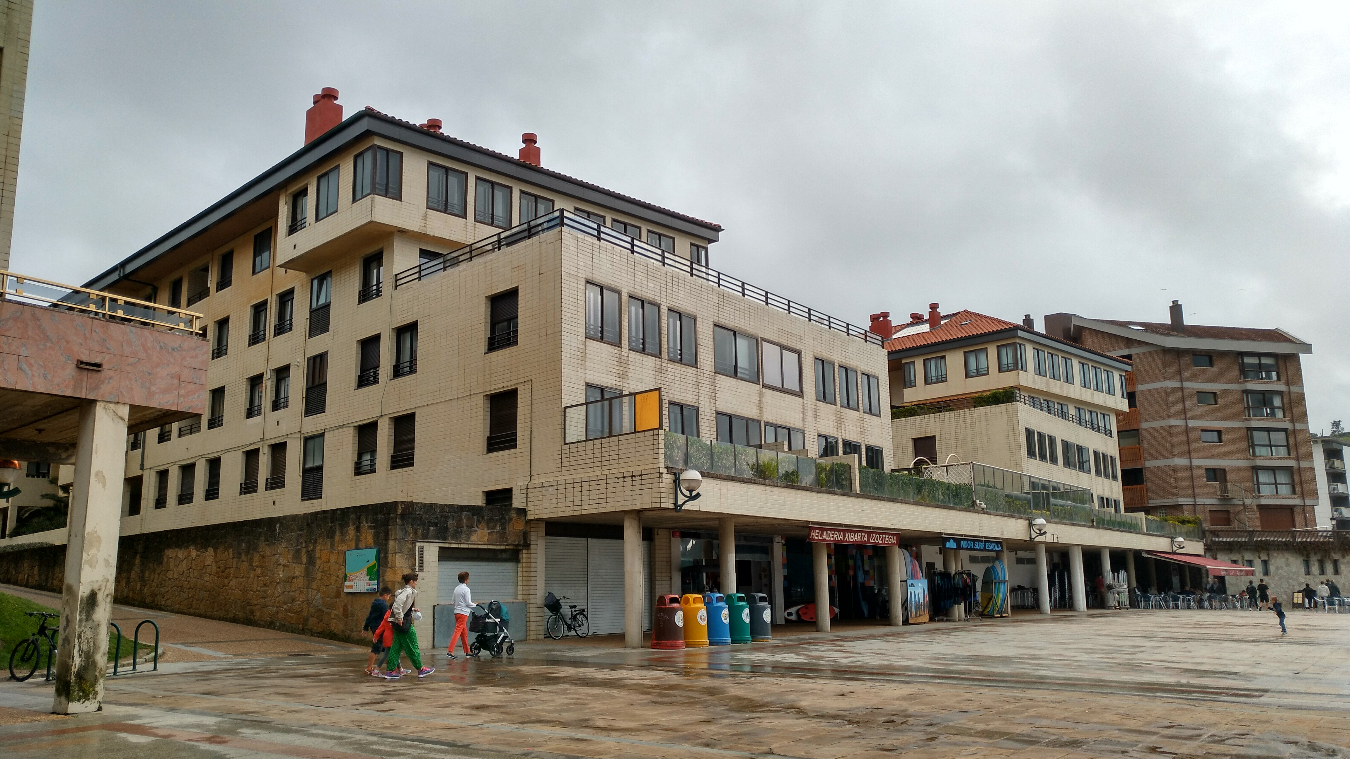 Zarauzko Eguzkilore urbanizazioa eta apartamentuak, Malekoitik ikusita. Bertan egon zen Gran Hotel eraikina mende batez.